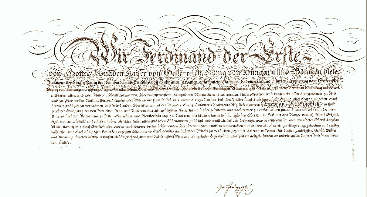 Stephani von Millenkovich Ernennung zum Obersten 19. April 1841